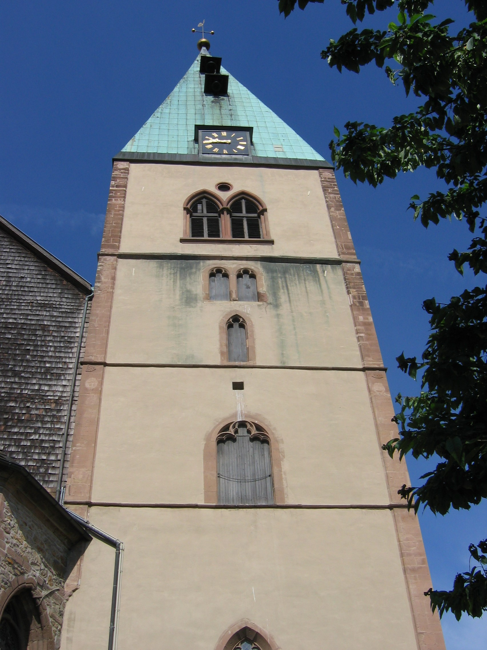 Ostturm der Pfarrkirche St. Marien zu Lemgo